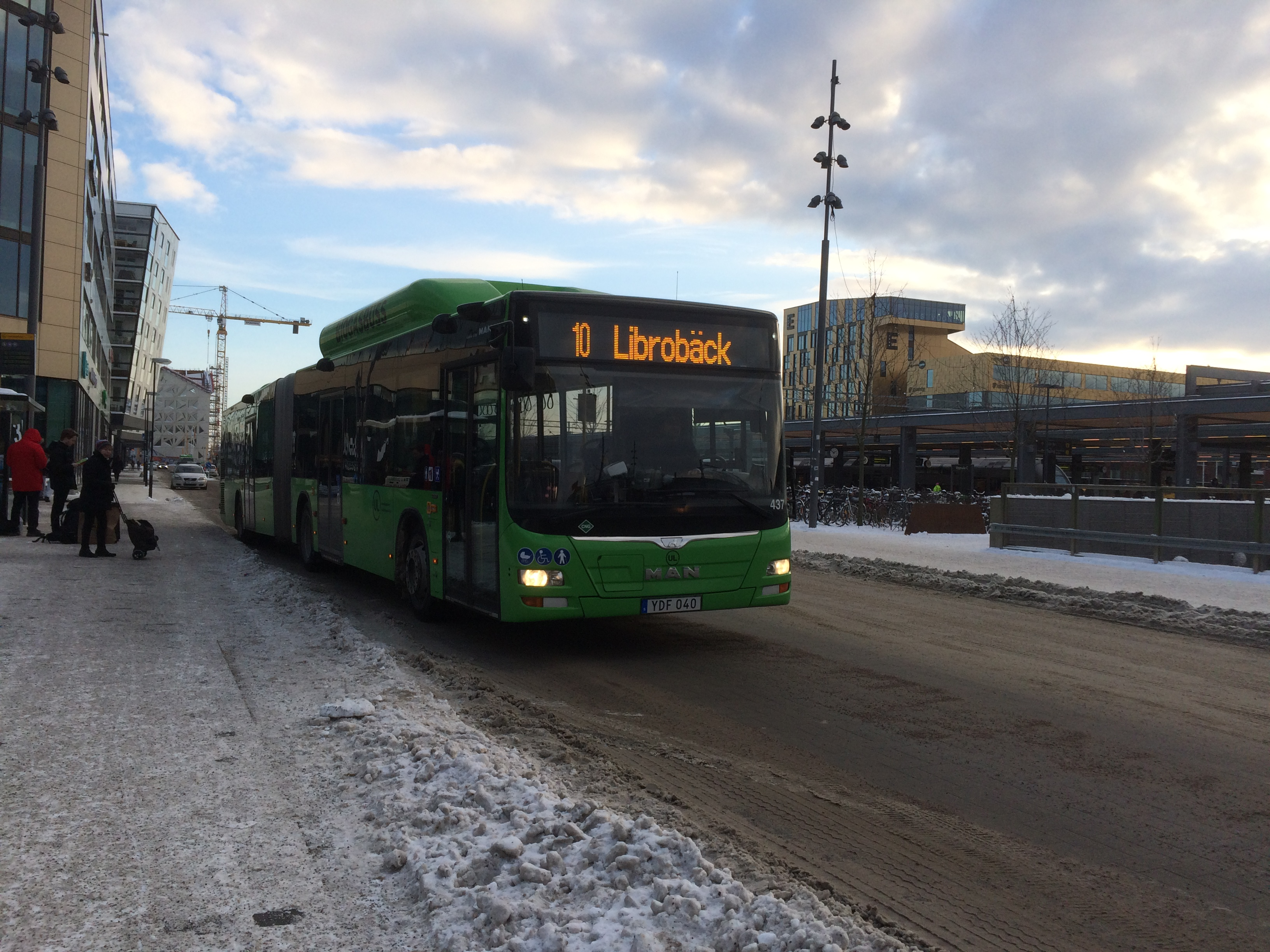 En modern MAN Lion's City CNG ledbuss på linje 10 mot Librobäck vid Centralstationen på nya linjenätet.